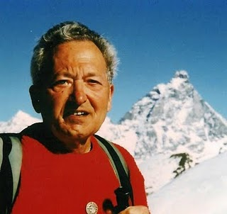 Foto di famiglia di Calo Casati